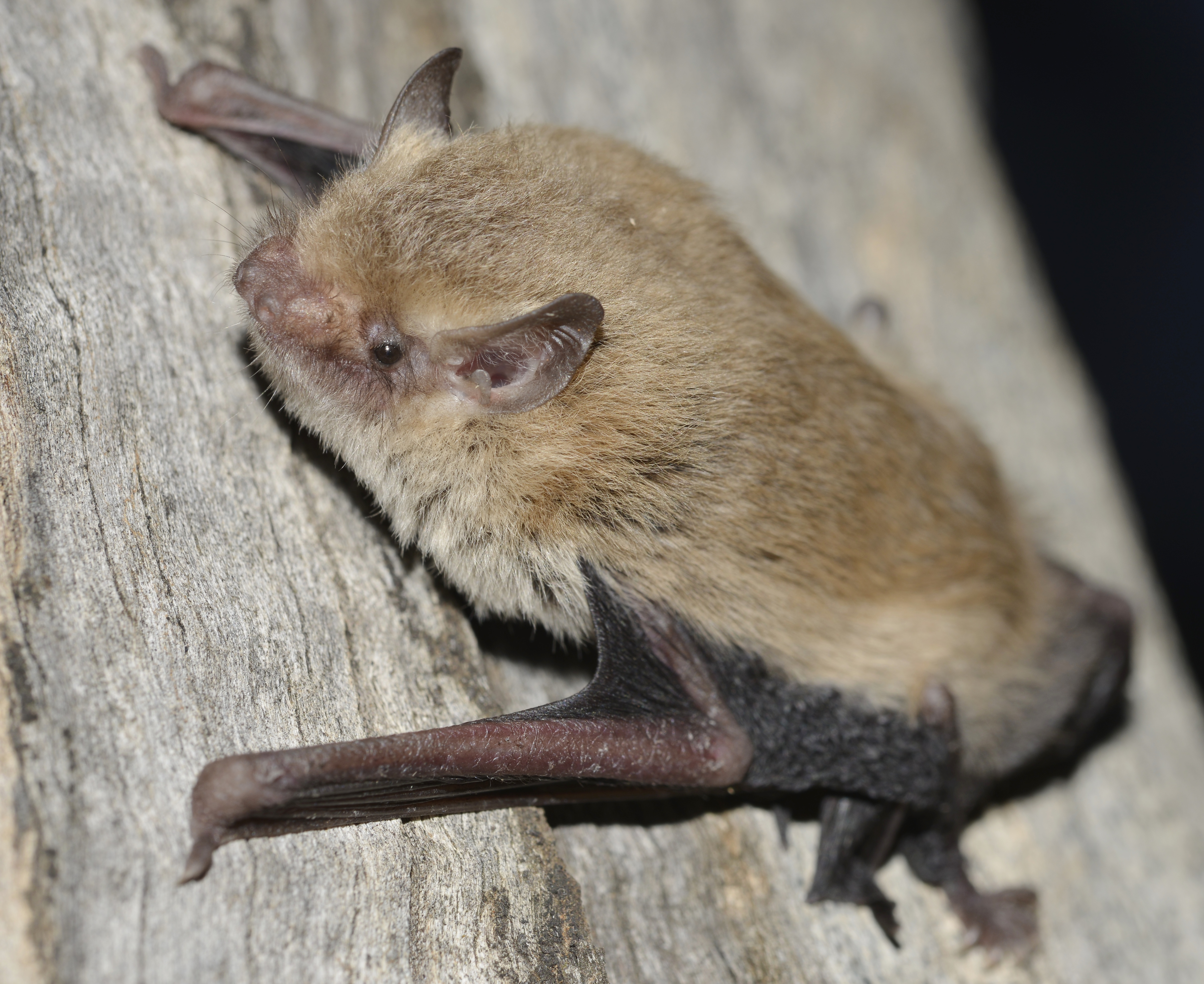 Vespadelus species